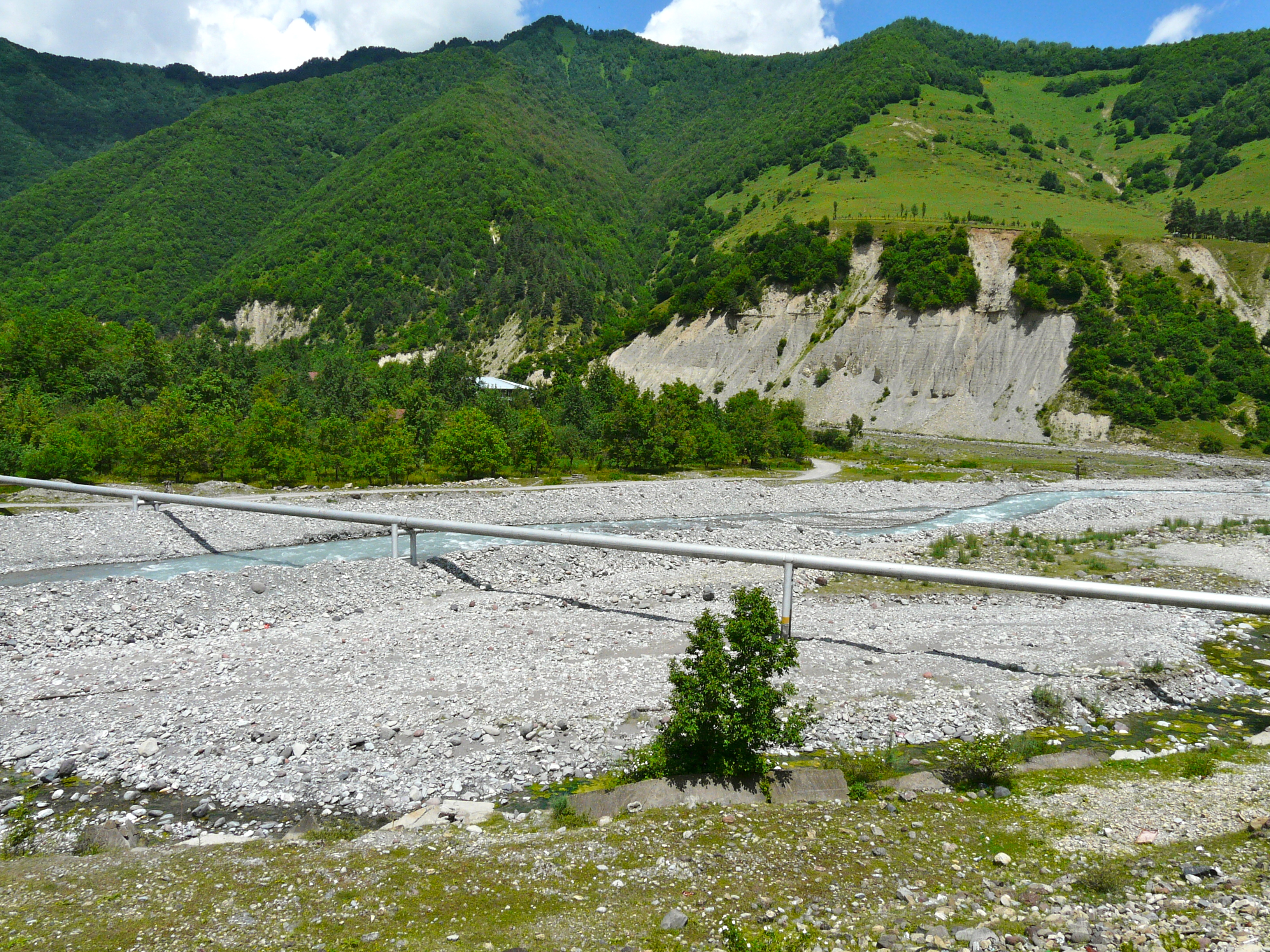 Russia - Armenia gas pipeline